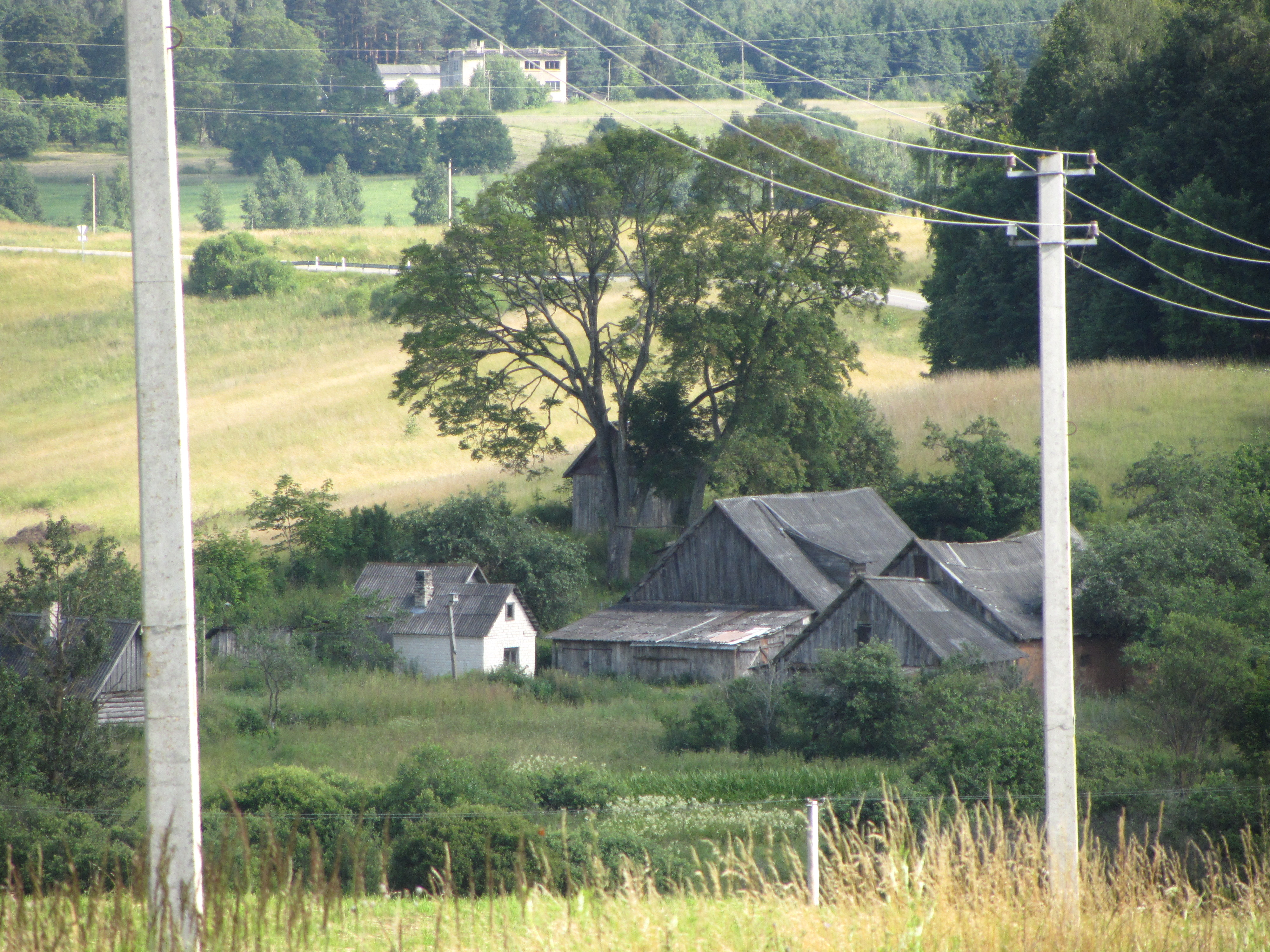 Kimbartiškė, Lithuania